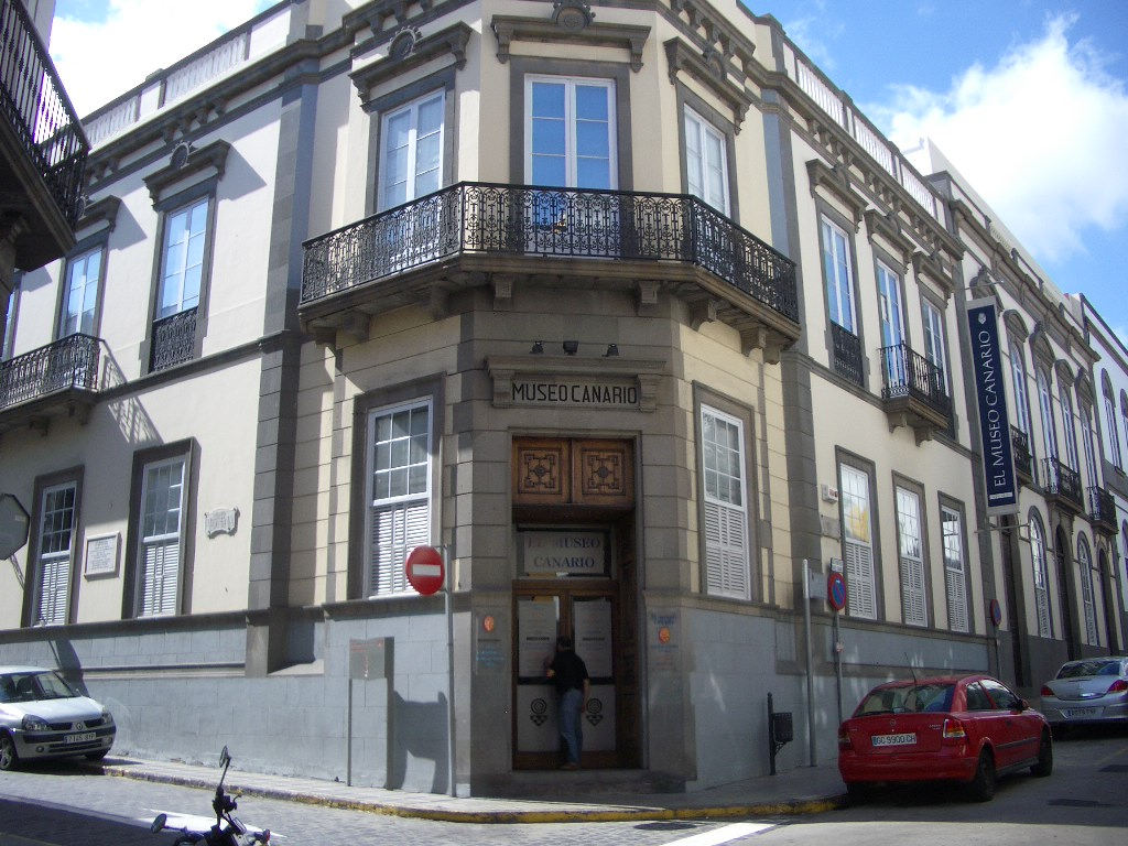 Fachada del Museo Canario en el barrio de Vegueta en la ciudad de Las Palmas de Gran Canaria.